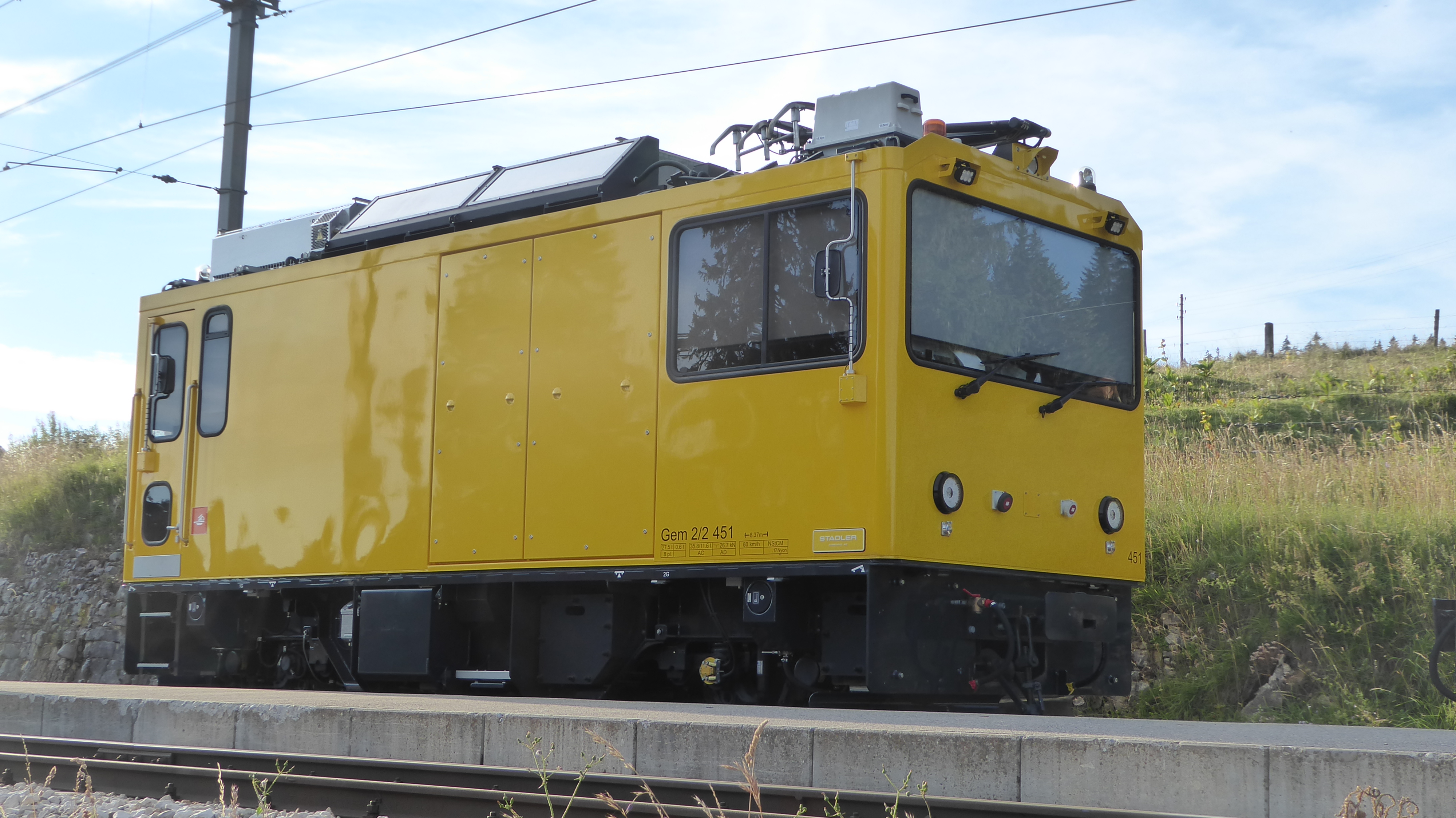 Zweikraftlokomotive Gem 2/2 451 der Chemin de fer Nyon–Saint-Cergue–Morez in La Givrine